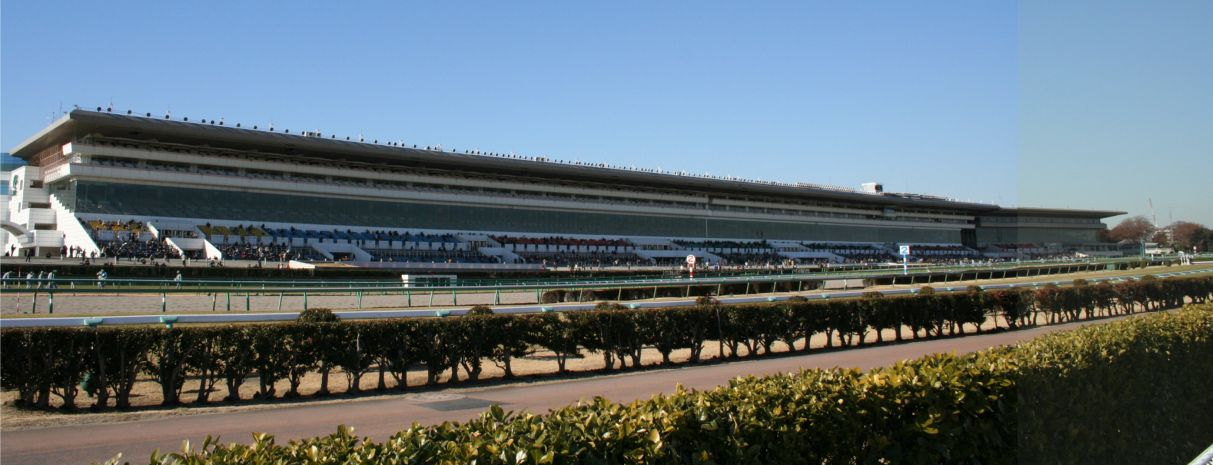 中山競馬場スタンド（2005年12月17日撮影）